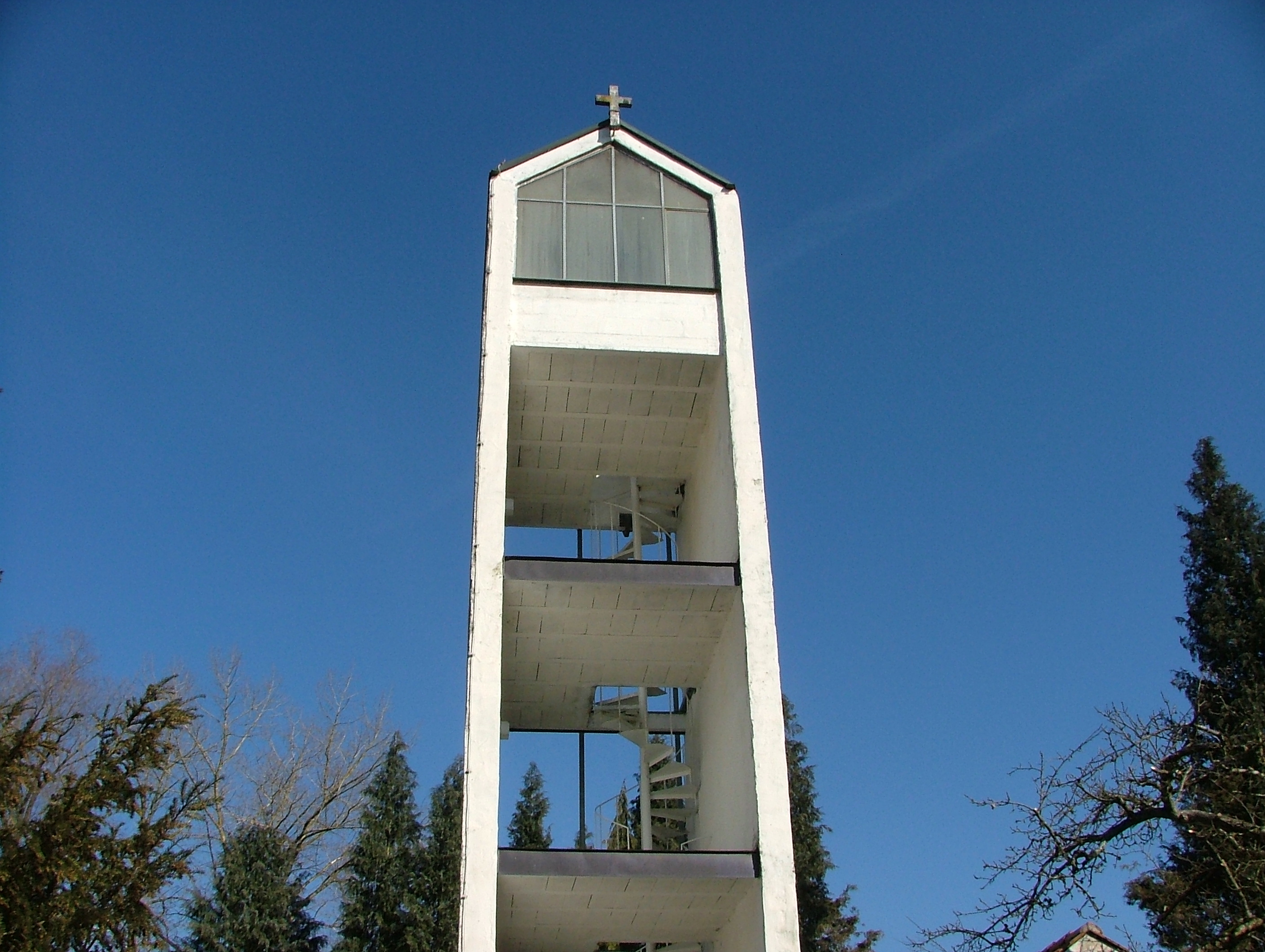 Kampanile der Kapelle in Eggisried, auf dem Gelände der Erich-Schickling-Stiftung